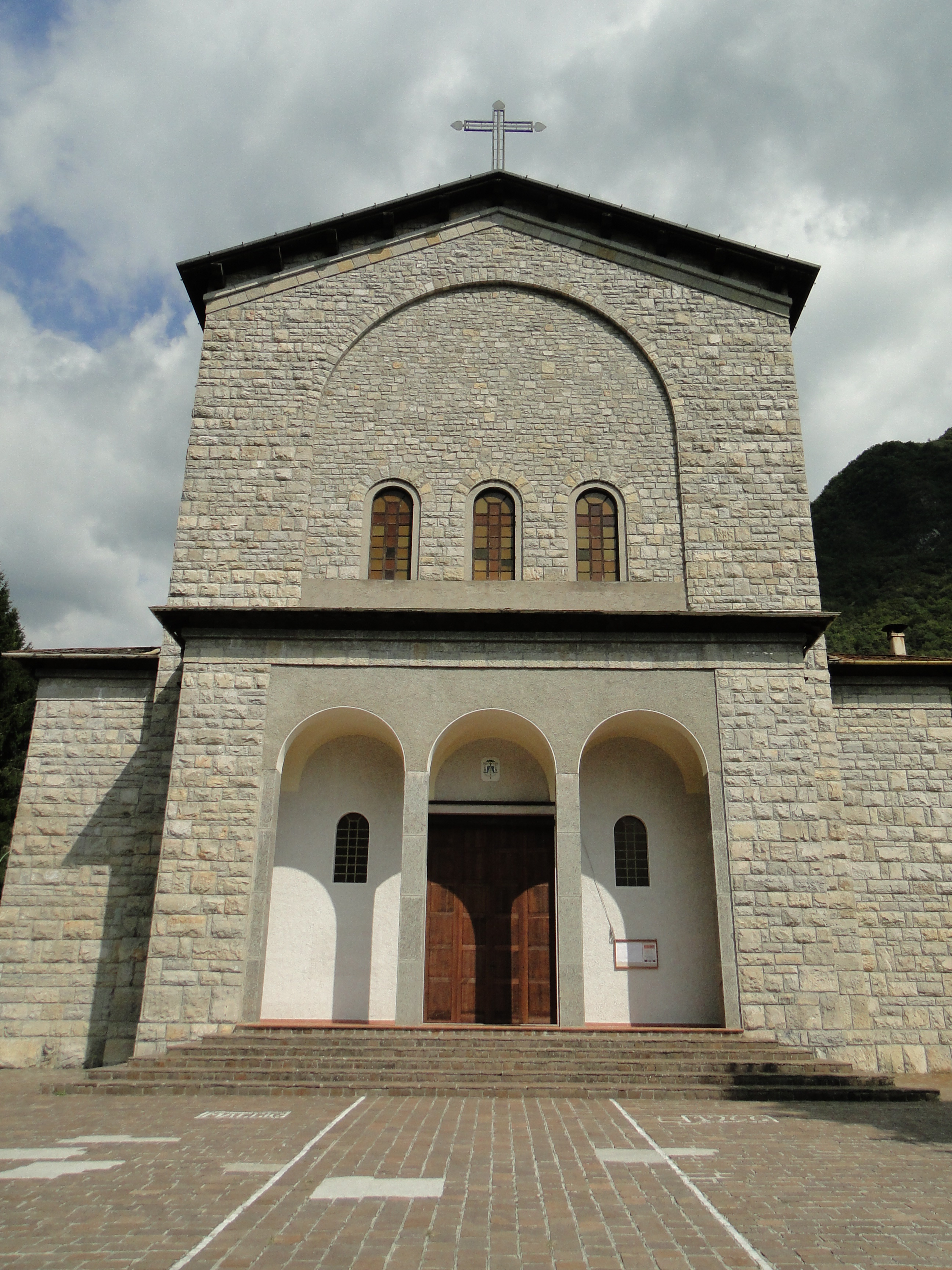 Villa d'Ogna (BG). Chiesa parrocchiale San Matteo